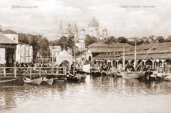 Петрозаводск. Вид с Онежского озера. Начало 20 века A pre-revolutionary postcard